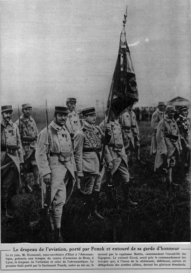 le Miroir_N°241_page 7_drapeau_de_l'aviation_tenu_par_Fonck_à_Bron.